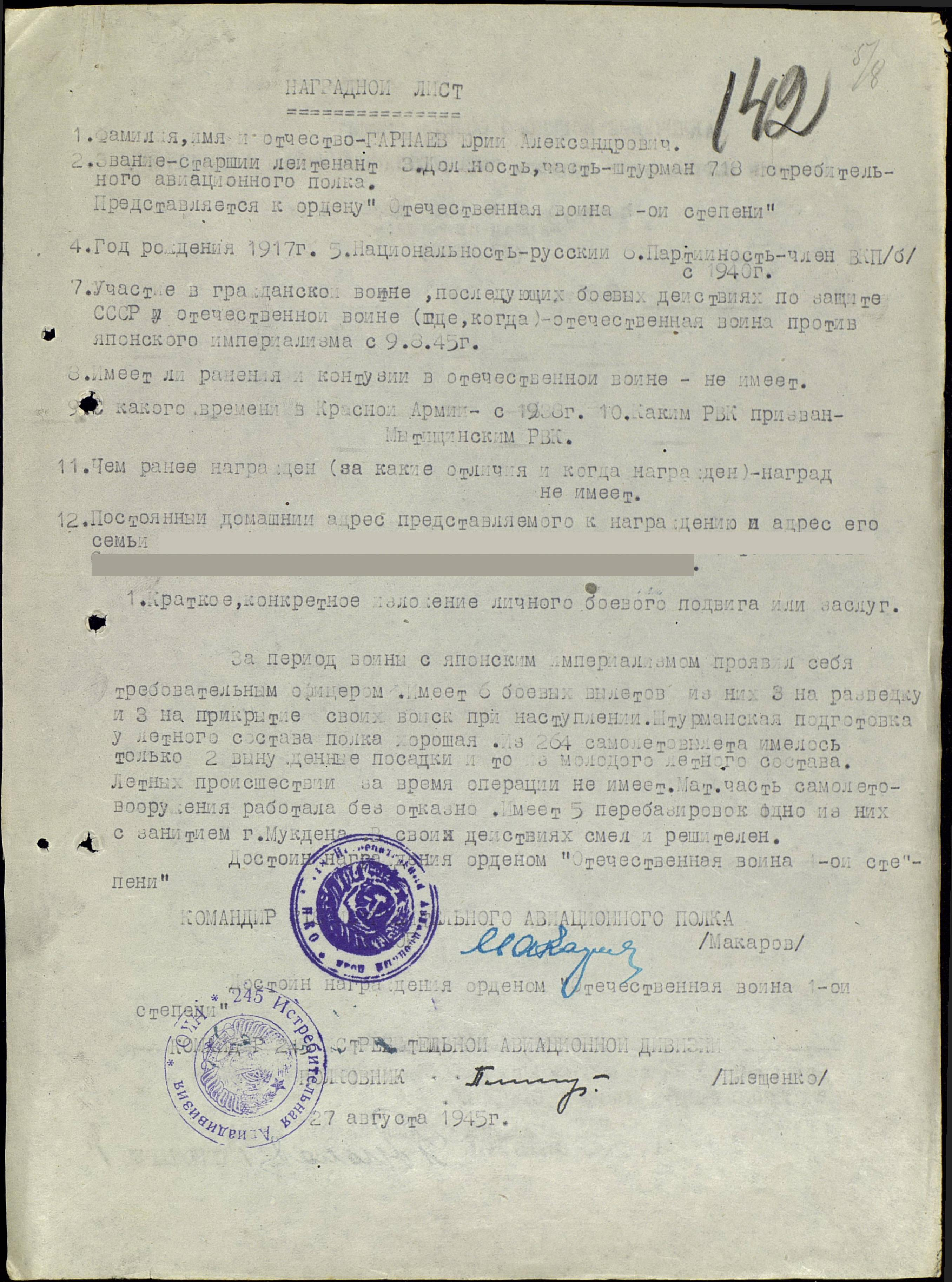 Наградной лист на Гарнаева